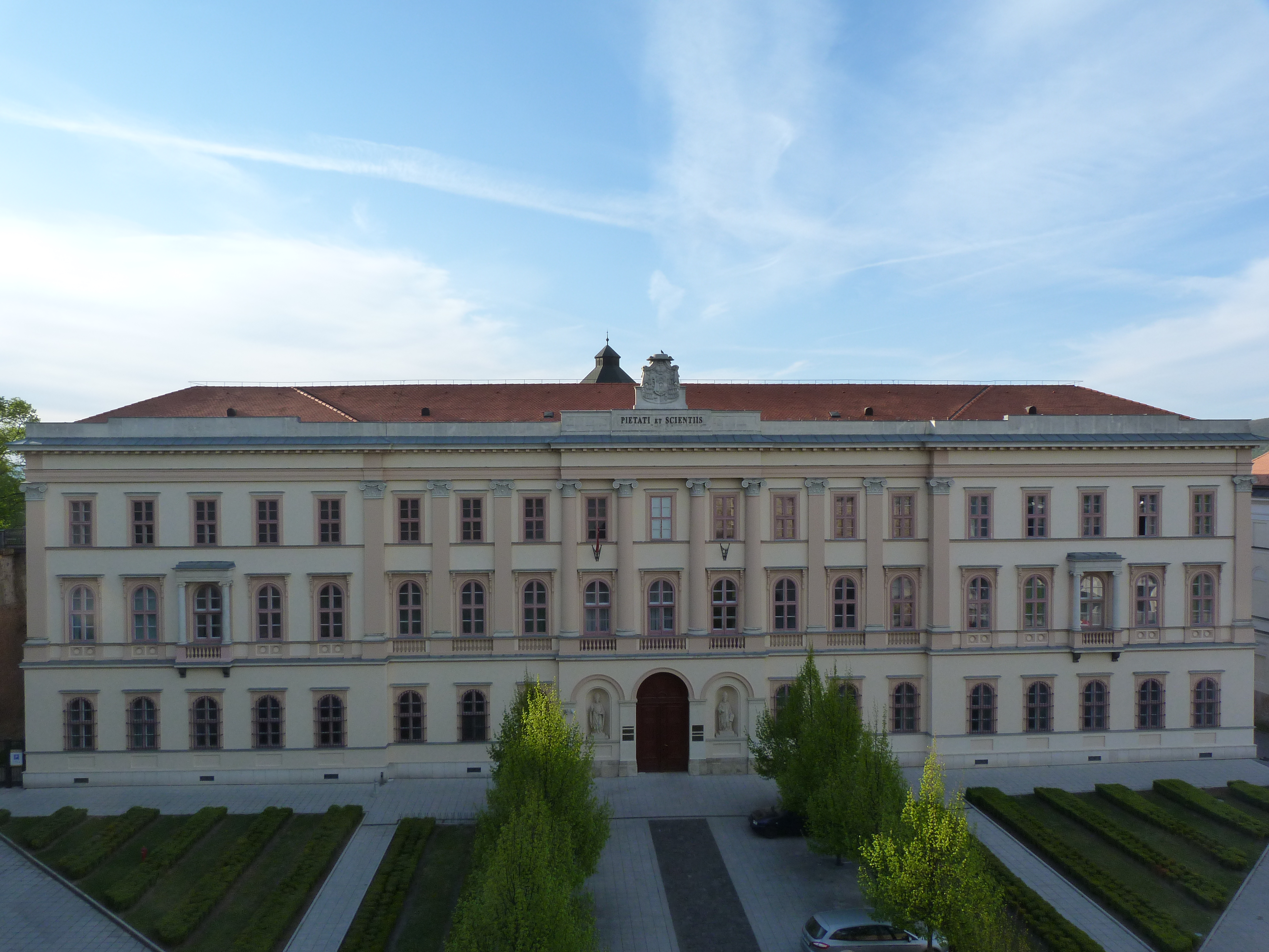 Esztergom. Ószeminárium. 2500 Esztergom, Szent István tér 1 szám. + 36 33 500135 ©© Derzsi Elekes Andor, Budapest, 2015, A fénykép másolását és felhasználását a szerző ellenérték nélkül megengedi. Az engedély kiterjed a kereskedelmi célú hasznosításra is. Kéri azonban nevének feltüntetését a felhasználás során. A Metapolisz sorozat valamennyi képe és filmje Creative Commons alatti. kereskedelmi - for profit - célra is felhasználható. Ajánlott hivatkozás: Derzsi Elekes Andor: Metapolisz DVD line This is a photo of a monument in Hungary. Identifier: 6241